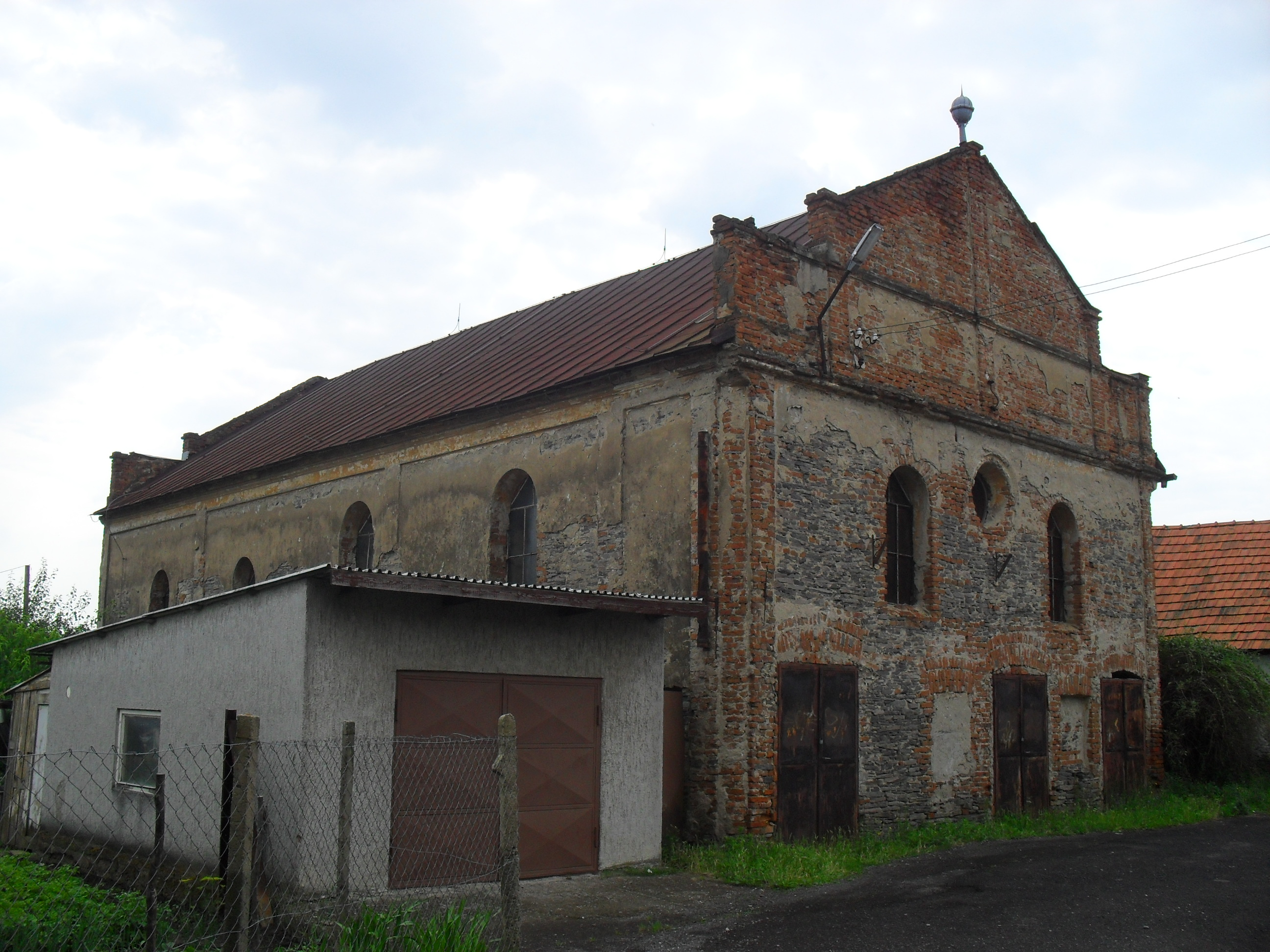 Királyhelmec - zsinagóga